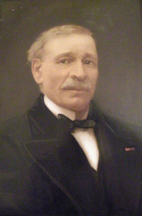 Photo Alphonse Brot (Français, 1807-1895), écrivain et auteur dramatique, inhumé au cimetière de Montmartre Saint-Ouen en 1895, repose depuis 1901 au cimetière du Père-Lachaise.